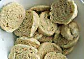 Knedliky